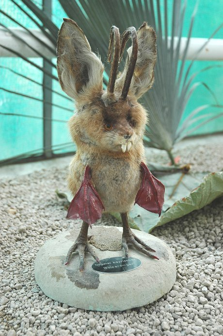 Wolpertinger